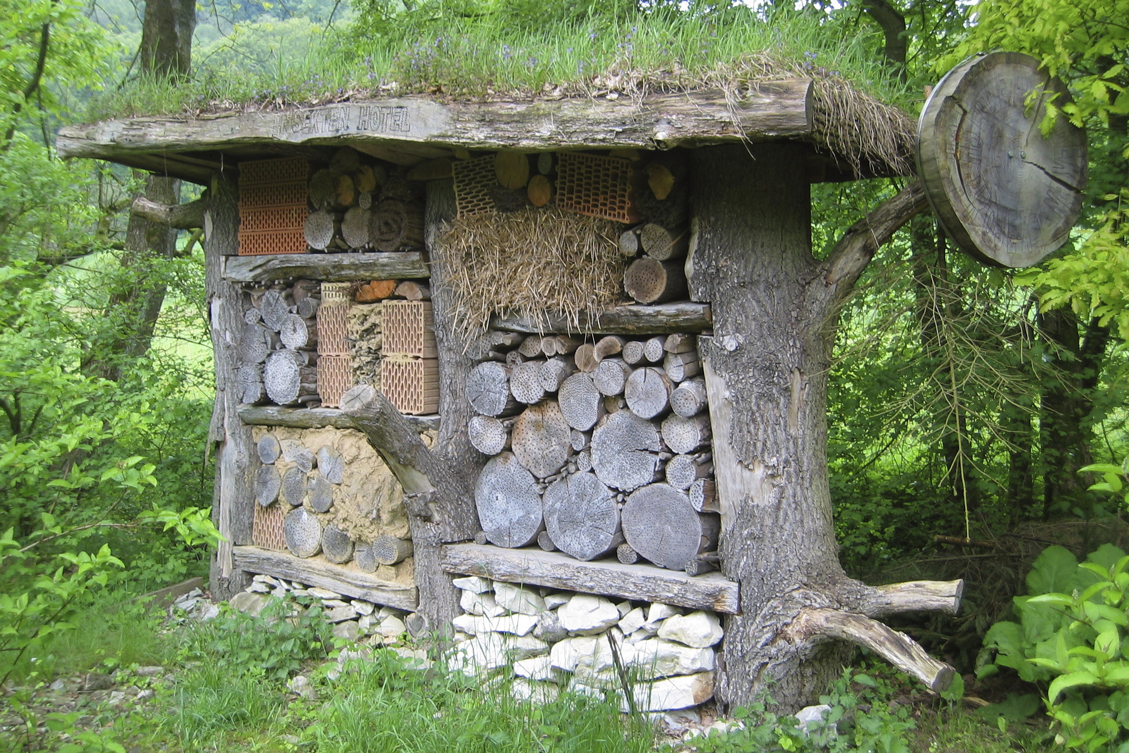 Im Jahr 2003 als Projekt der Hauptschule Egge, Altenbeken, errichtetes Insektenhotel am Waldhaus Durbeke in Altenbeken, Nordrhein-Westfalen, Deutschland.